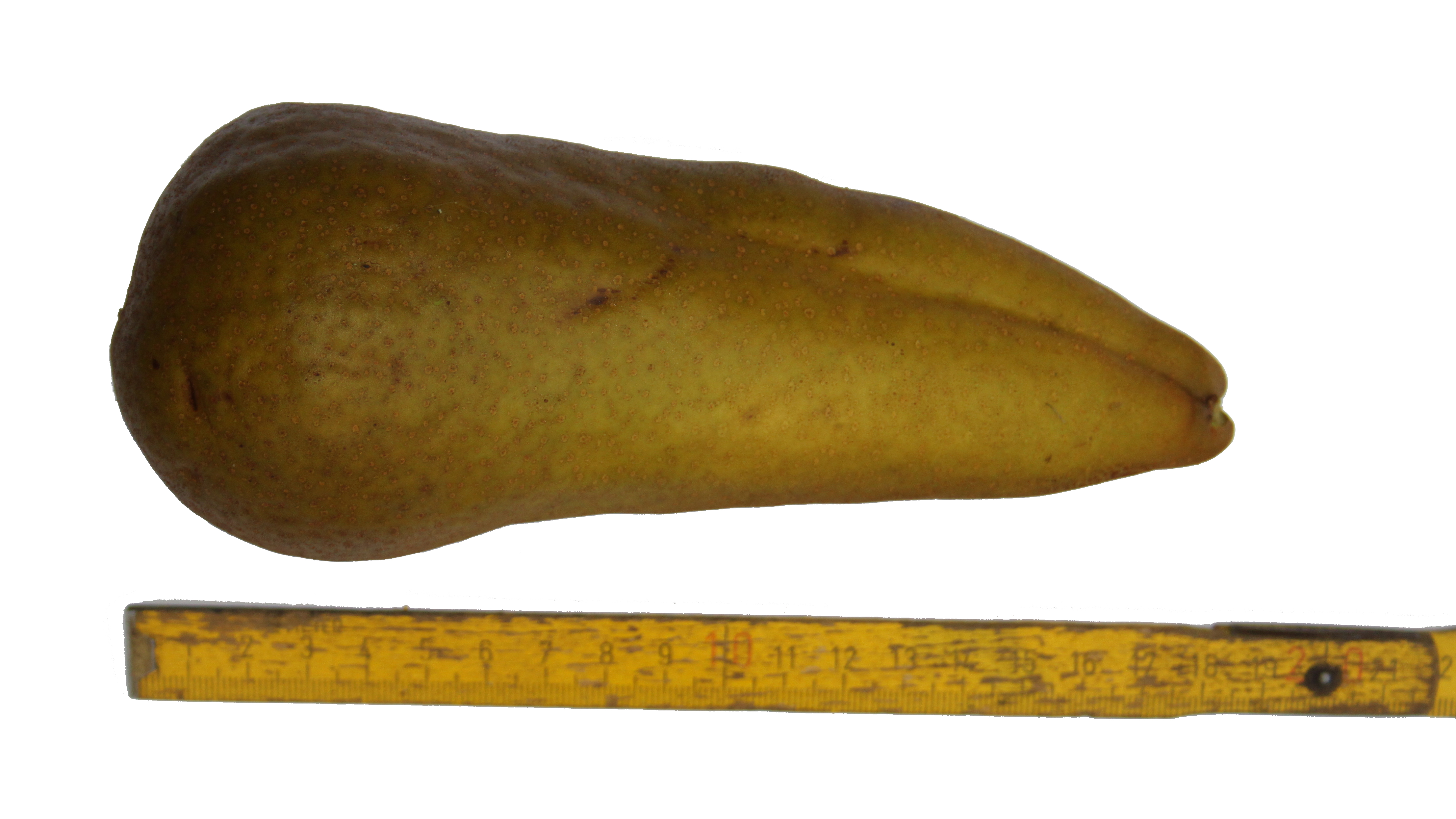 Birne der Sorte Kaiserkrone (synonym Prinzessin Marianne)